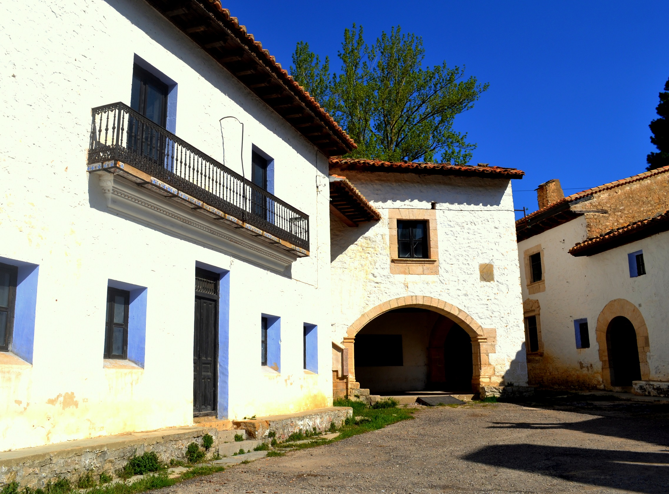 Ermita de la Mare de Déu de la Font (Castellfort)